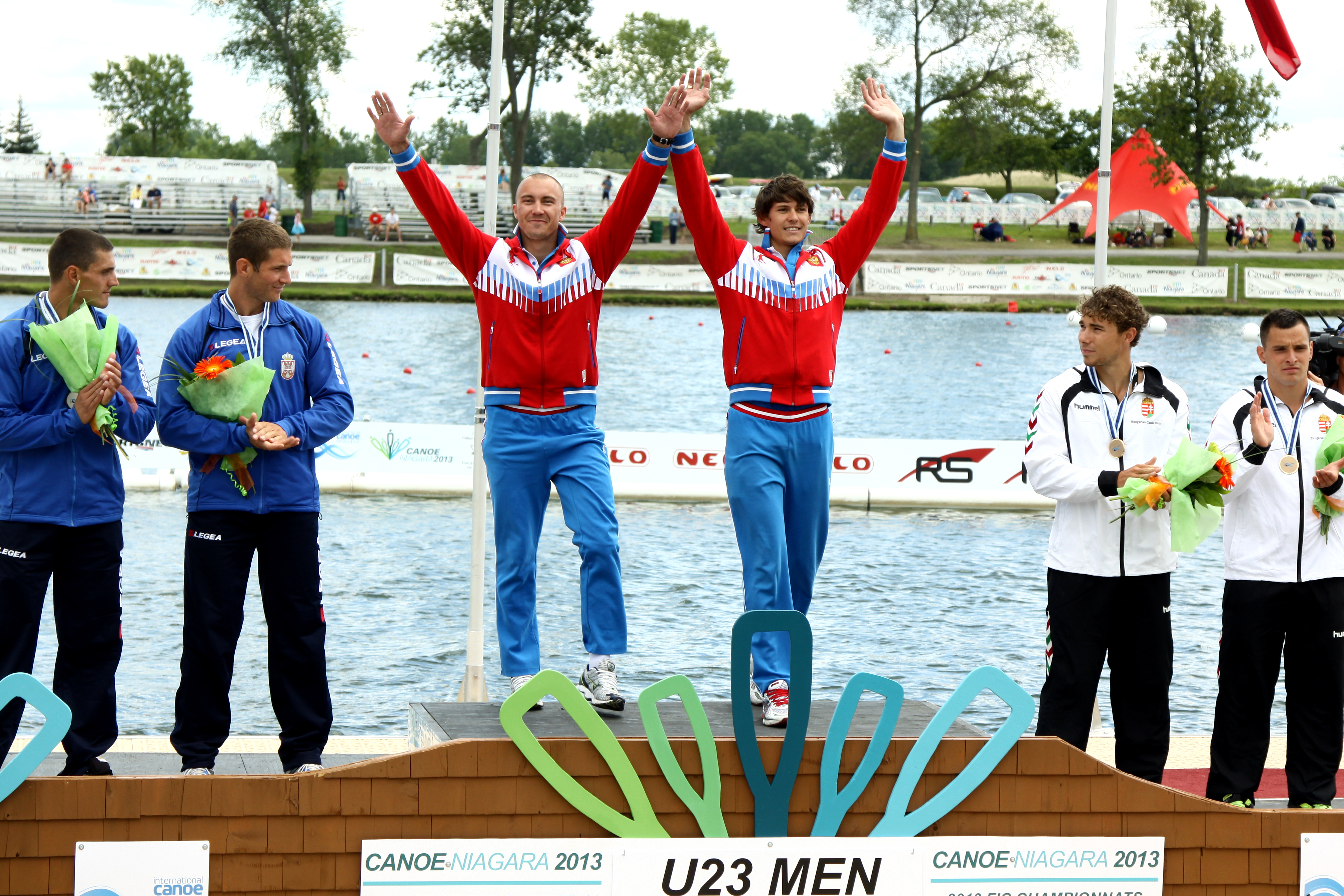 Чемпионат Мира среди молодежи по гребле на байдарках и каноэ, Канада 2013